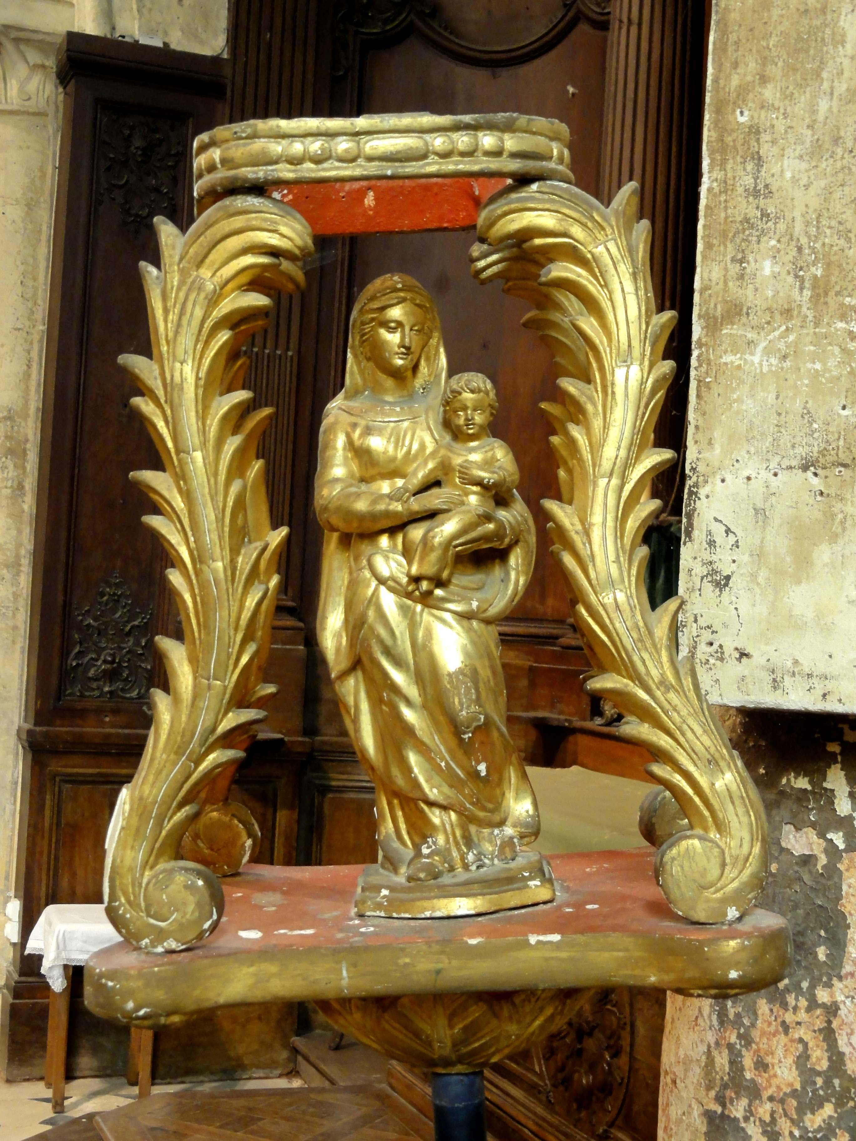 Mobilier de l'église (voir titre).